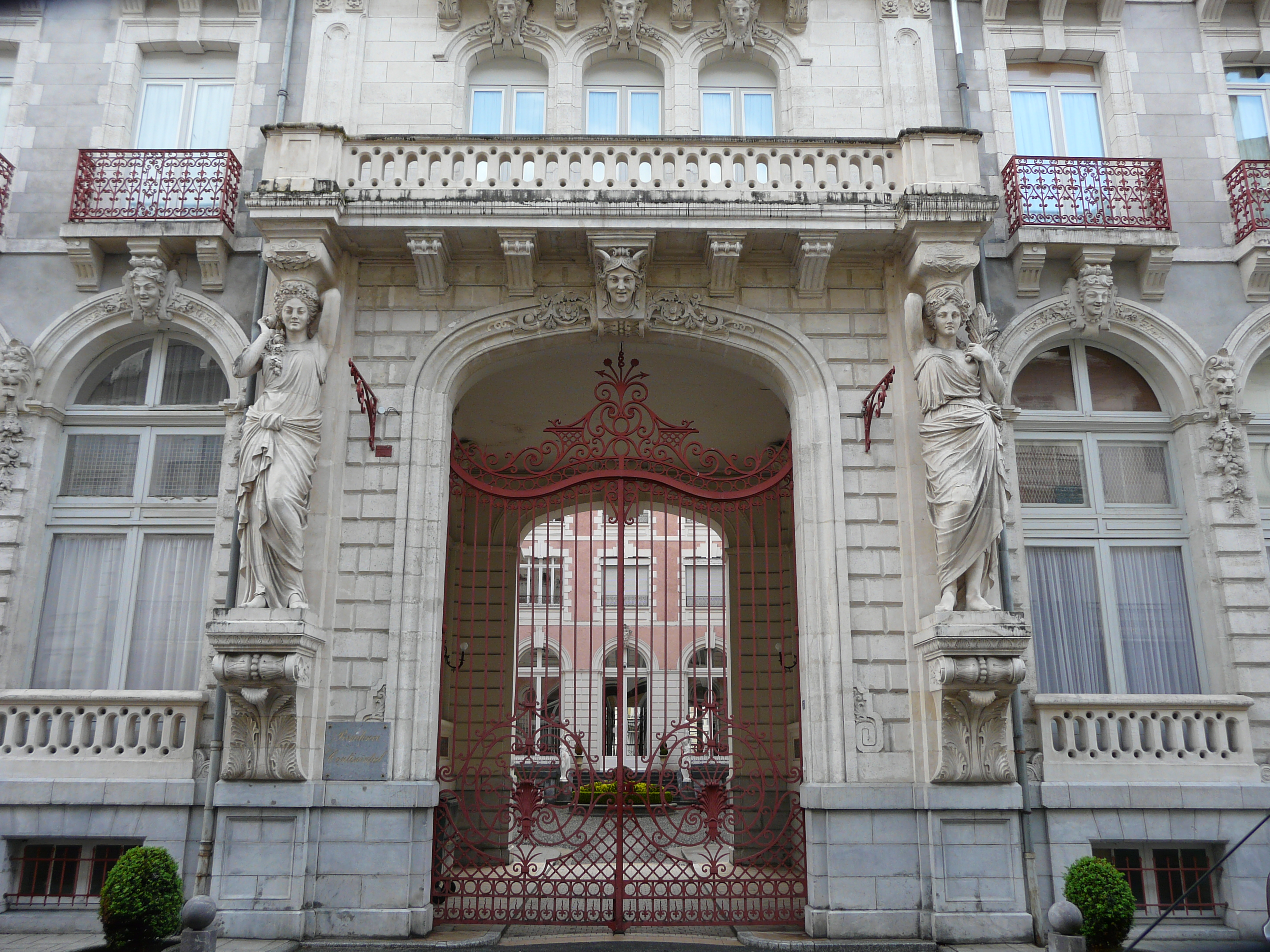 Le portail sur rue de l'immeuble Continental Résidence, 5 boulevard Latapie-Flurin, Cauterets, Hautes-Pyrénées, France.